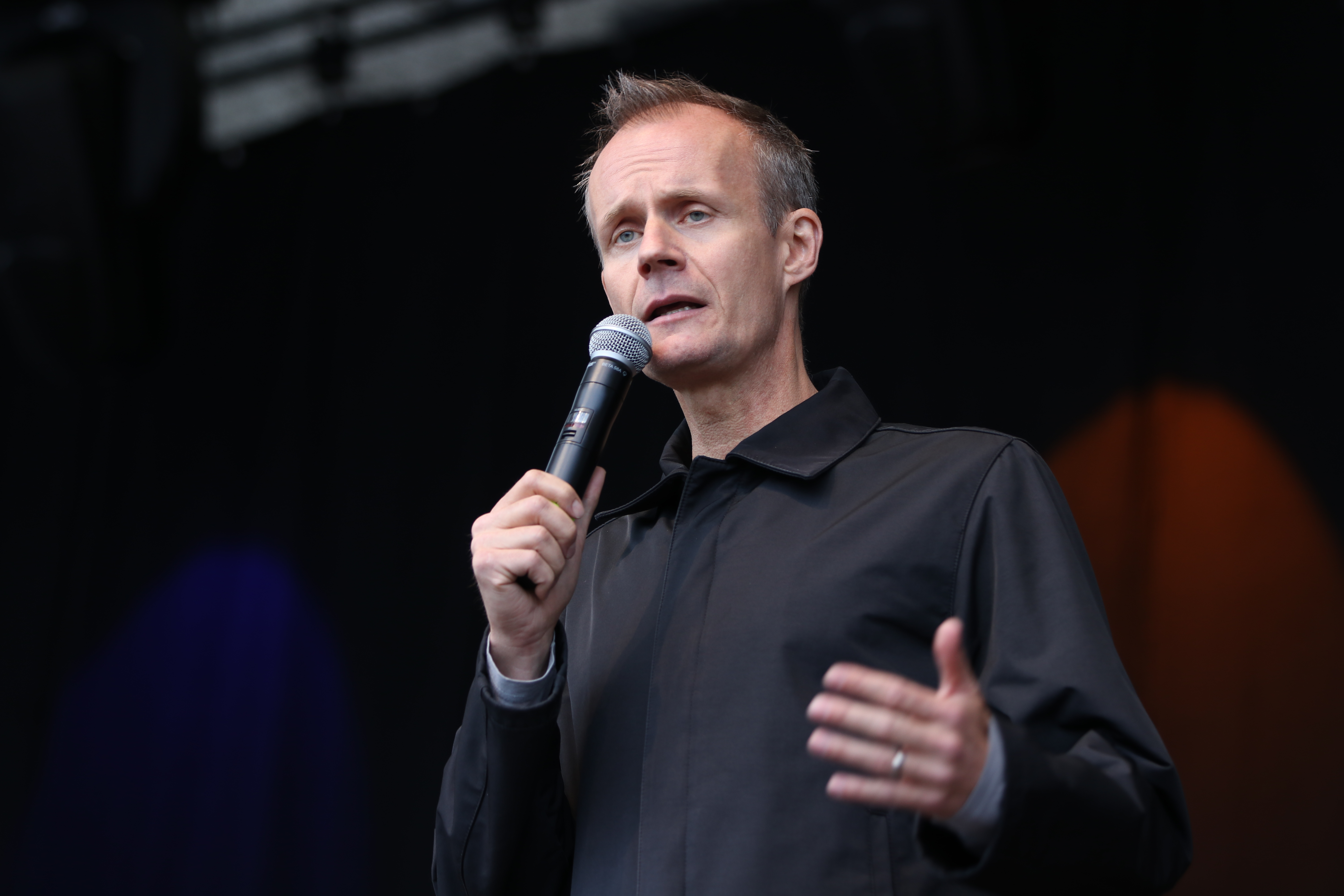 Ausgehetzt, Demonstration in München am 22. Juli 2018 gegen den Rechtsruck in der bayerischen Politik